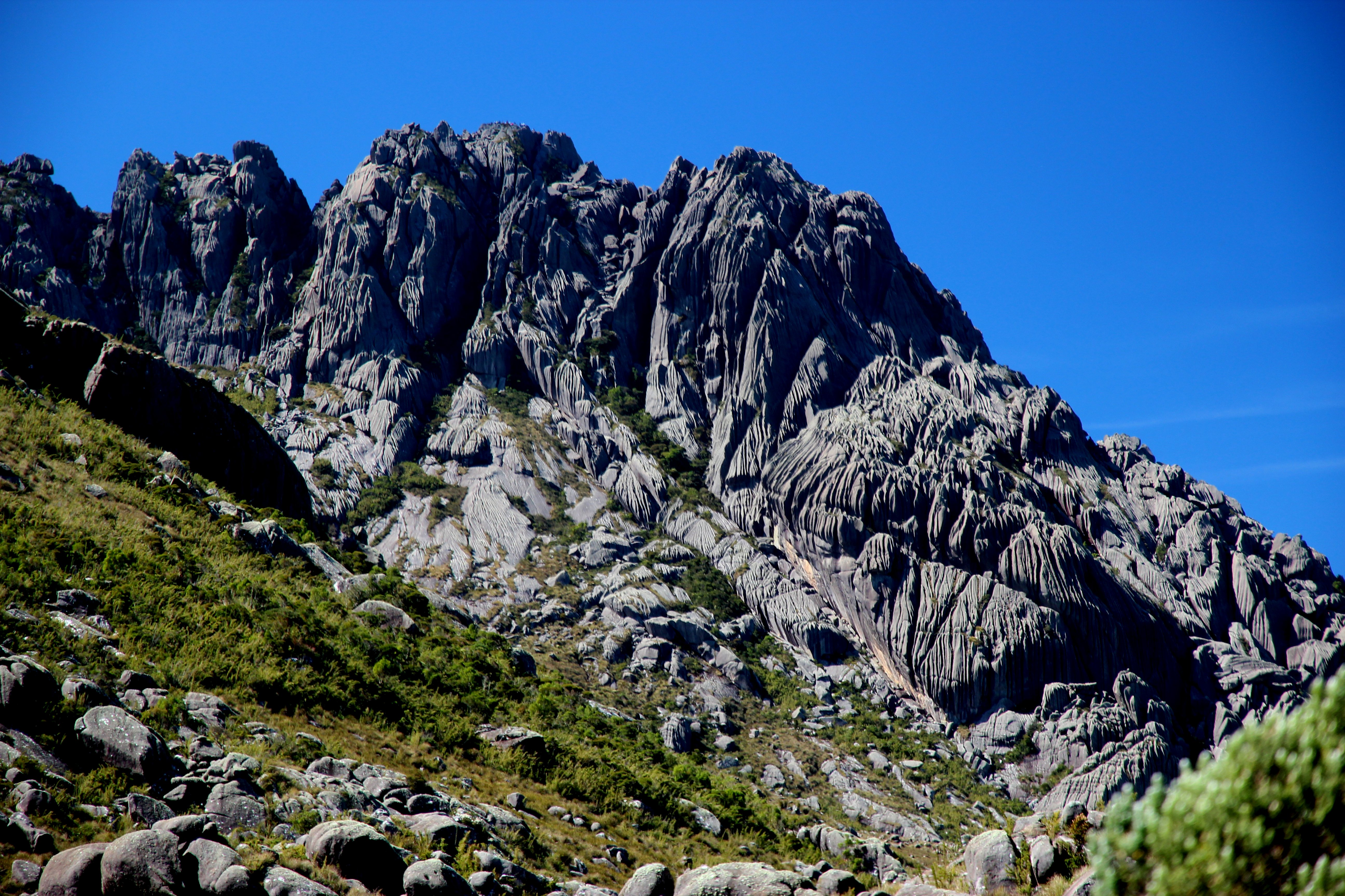 Pico das Agulhas Negras no Parque Nacional do Itatiaia, Rio de Janeiro. por Henrique Boney